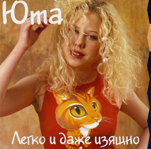 Обложка альбома Юты «Легко и даже изящно». Переиздание 2004 года